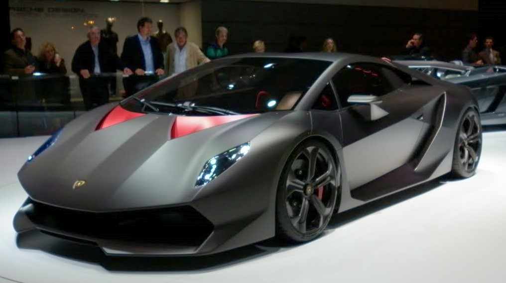 Lambo sesto elemento Paris 2010